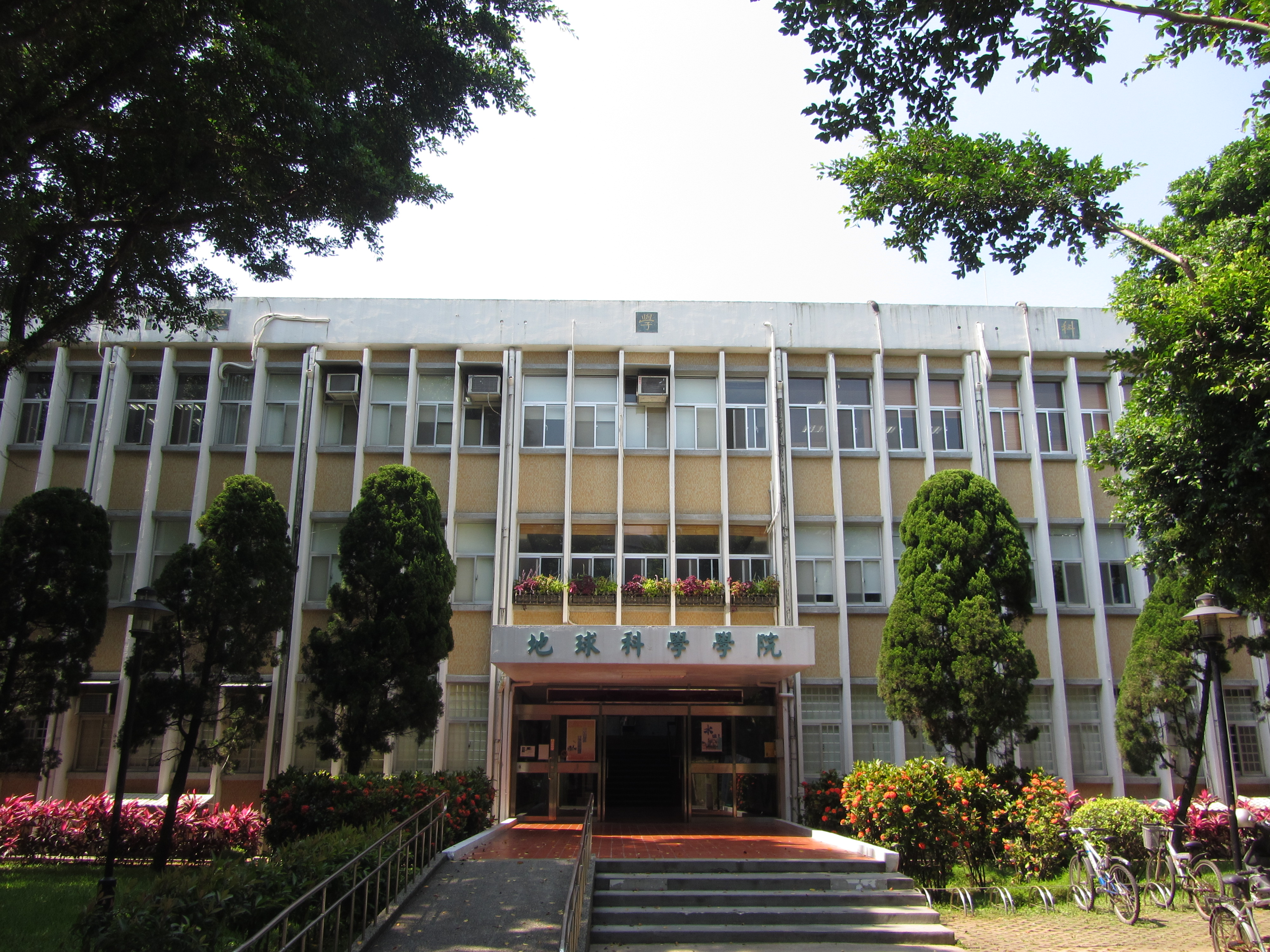 國立中央大學地球科學學院（科學一館）